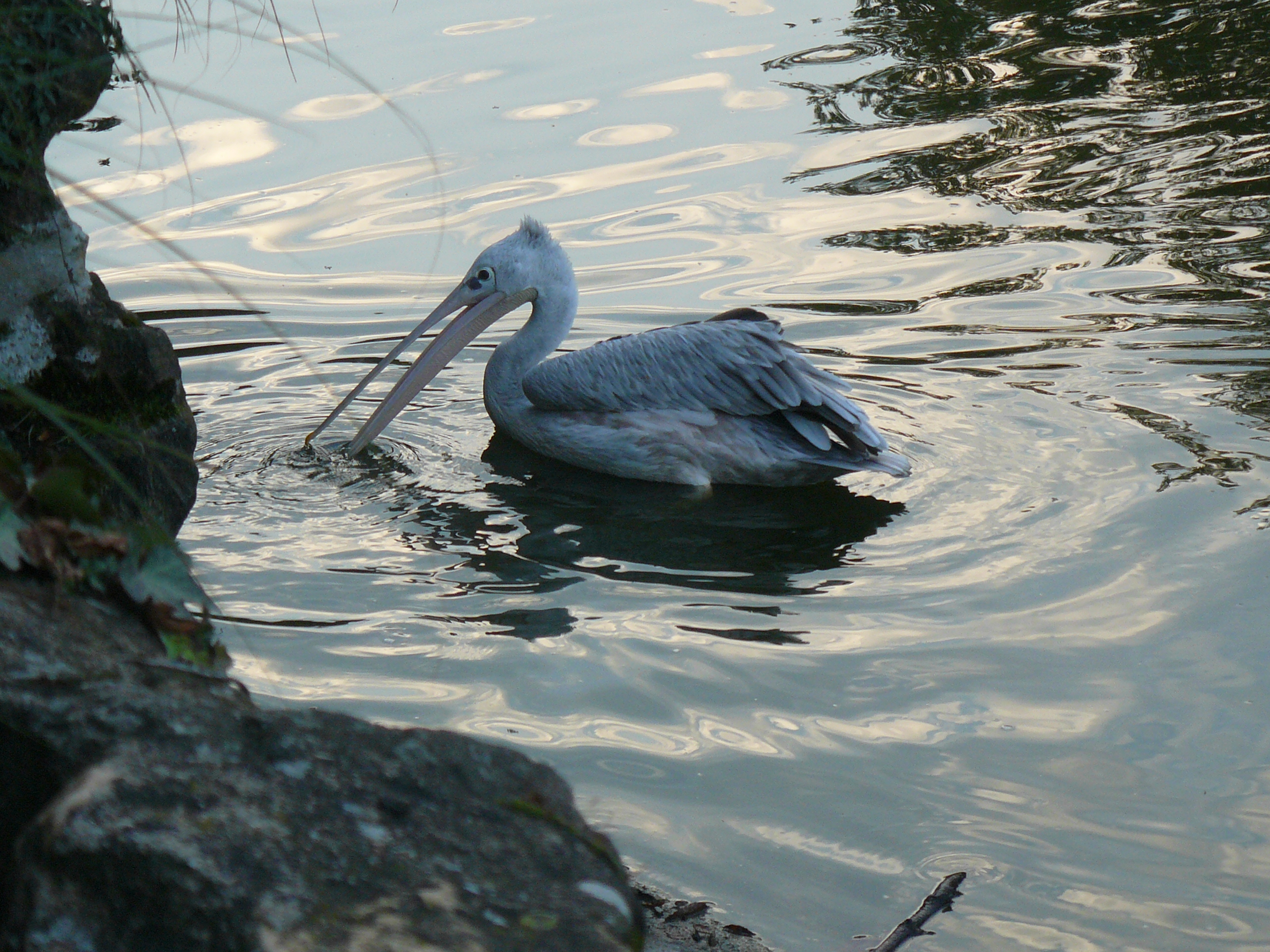 Pélican gris (Parc de la Tête d'Or, Lyon, France)